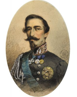 Italian general Alfonso La Marmora (1804-1878)